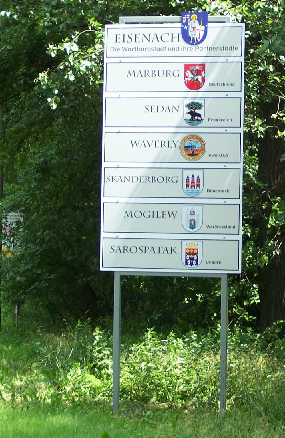 Die neu gestaltete Tafel der Eisenacher Partnerstädte im Mariental.